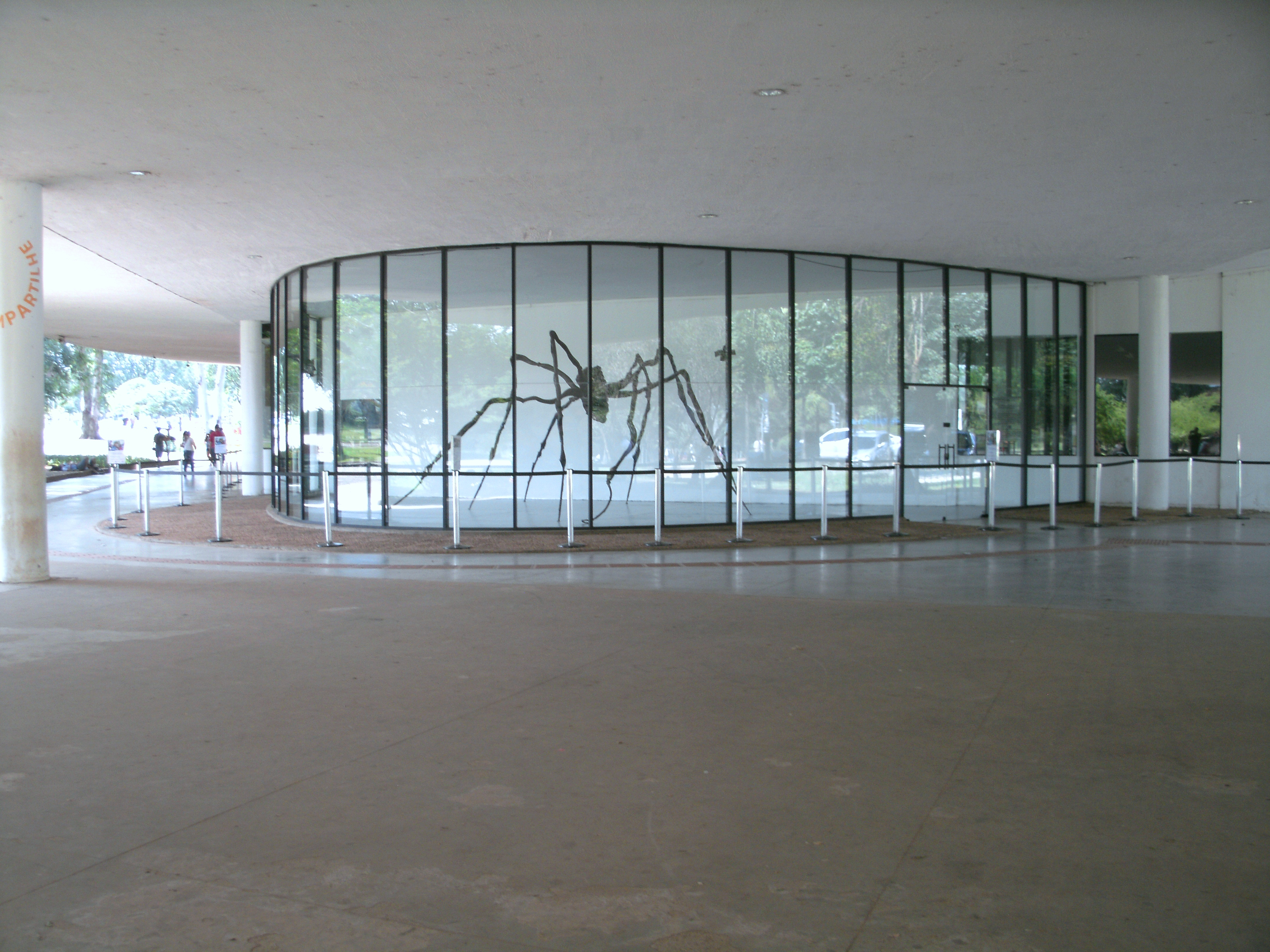 MAM - Aranha - Louise Bourgeois - Parque do Ibirapuera